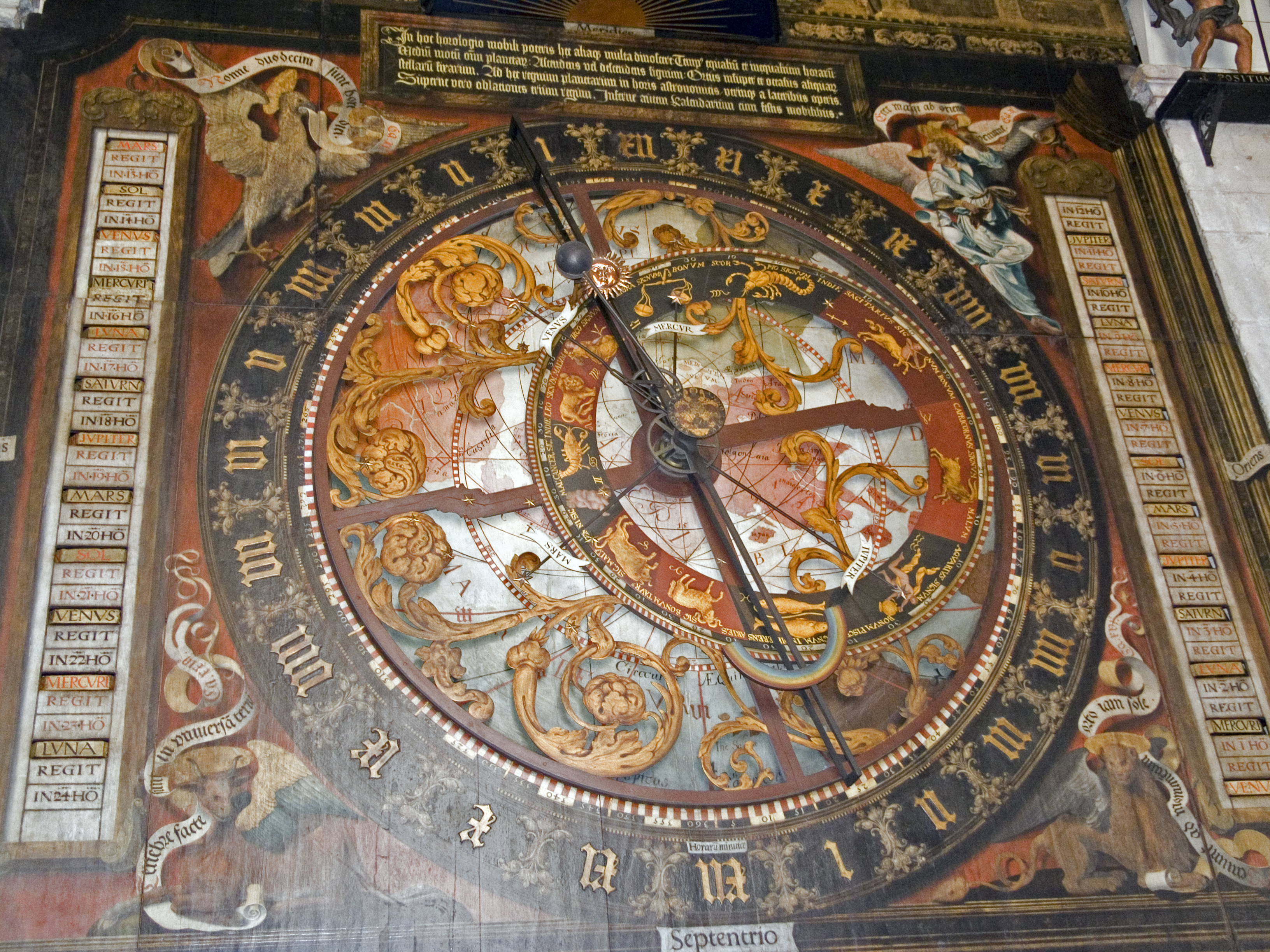 Северный Рейн - Вестфалия, Мюнстер - собор Святого Павла